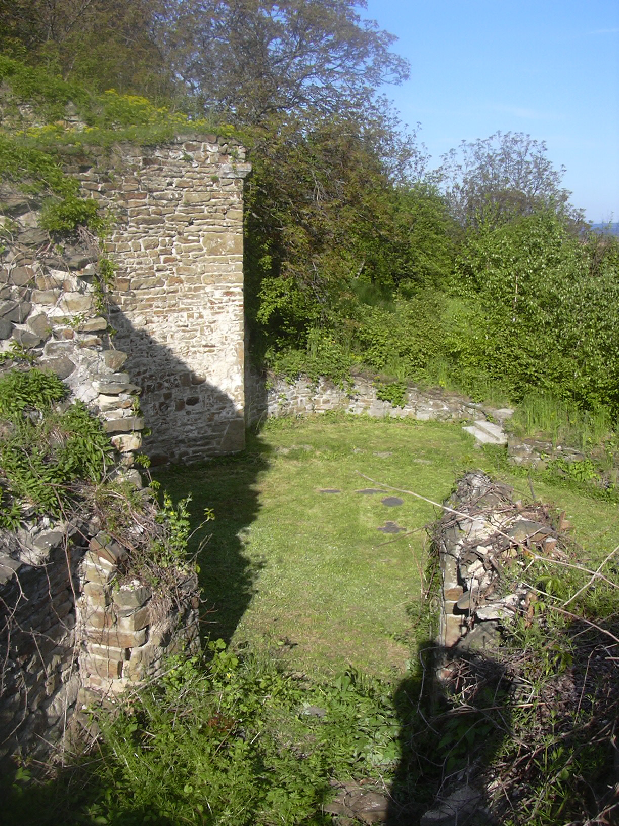 Rotunda_sv._Pantaleona v Pustiměři nachází se nad kaplí sv. Anny (Vyškov District, Czech Republic)